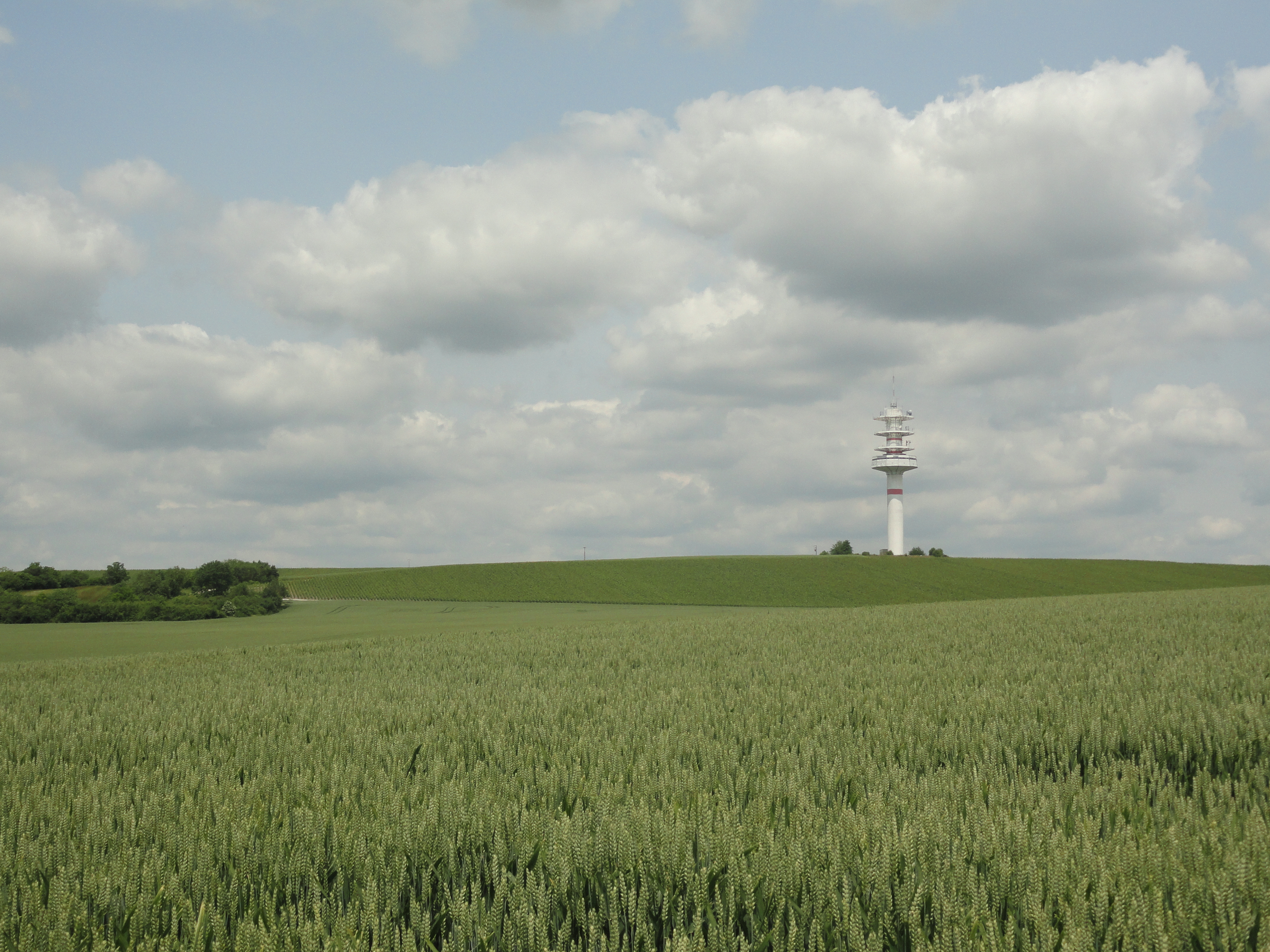 Vue depuis Glannes des vignes (Les Chaînées) et de la Tour de télécommunications du Mont Vignereux.